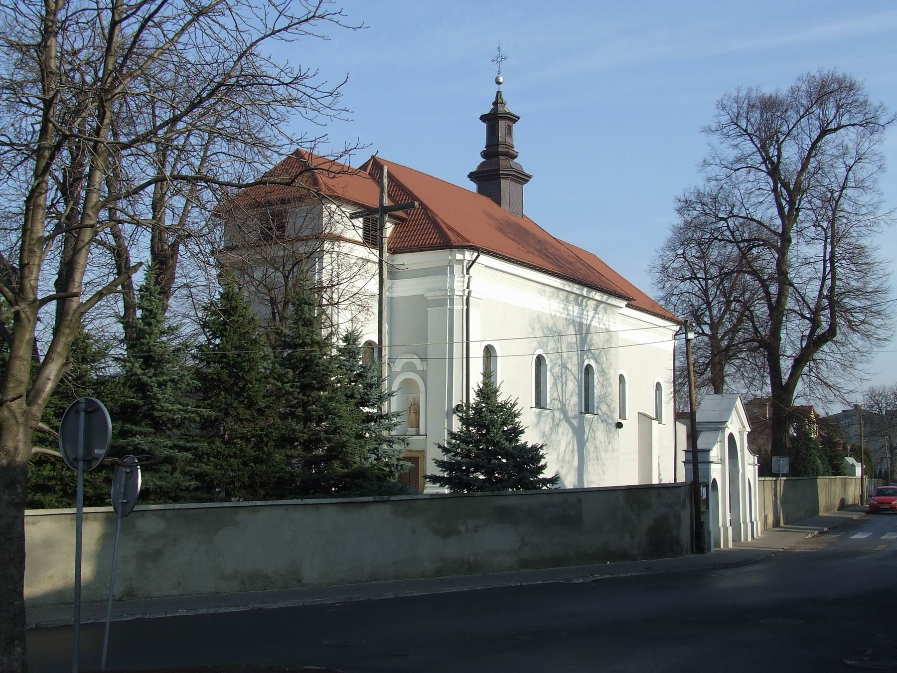 Rawa Mazowiecka, kościół p.w. Wniebowzięcia NMP, w zespole klasztornym augustianów, ob. oo. pasjonistów, mur., 1790 (zabytek nr rejestr. 235/781)